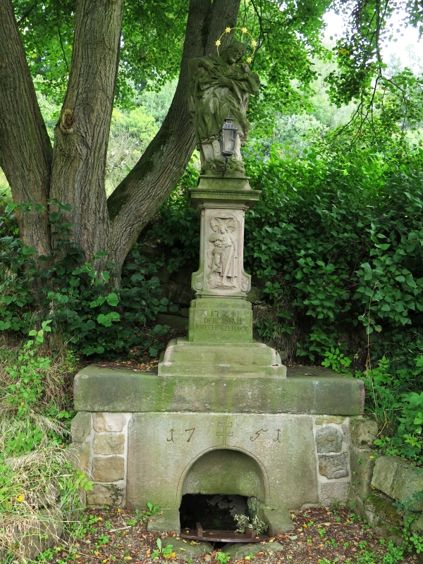 Sloup se sochou svatého Jana Nepomuckého, okraj obce, nad prameništěm vody, Jívka.